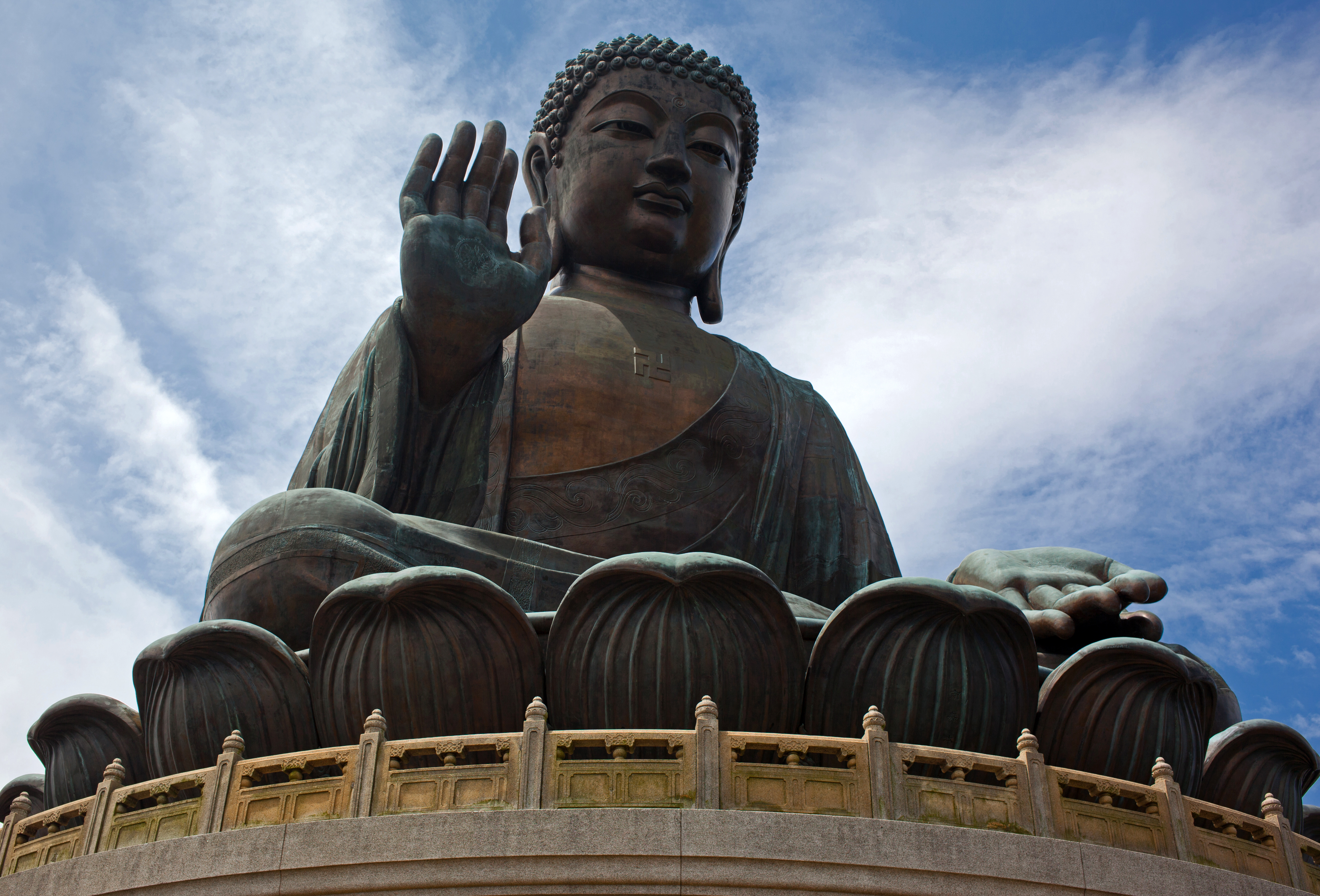 Tian Tan Buddha